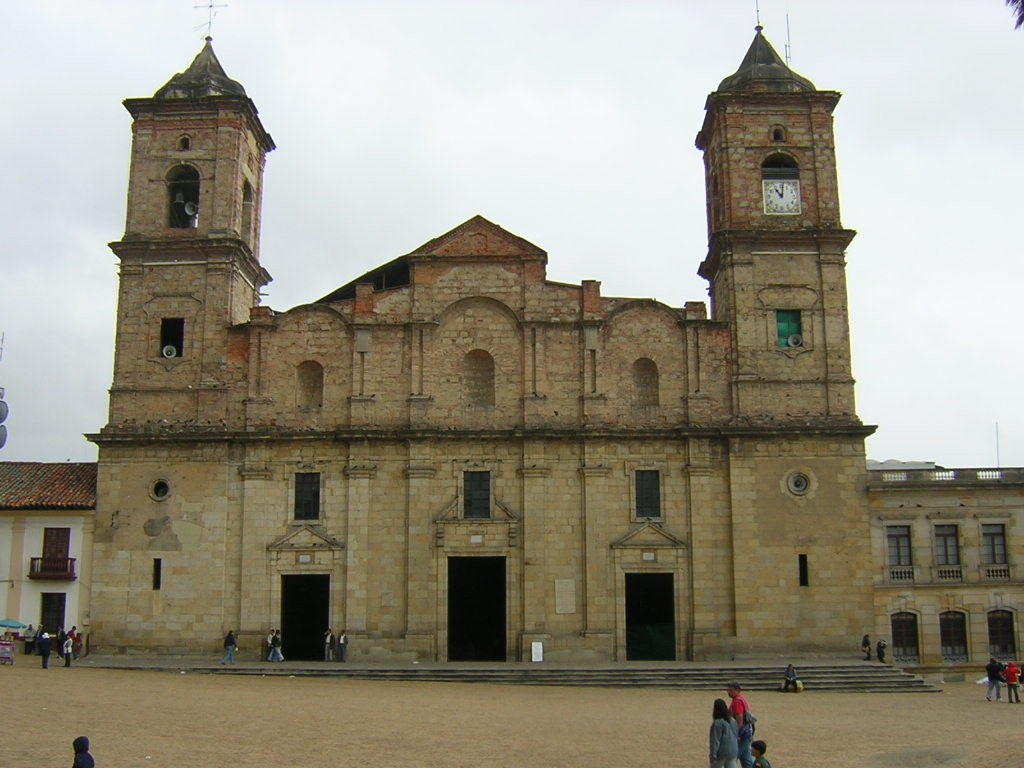 Iglesia de Zipaquira, Cundinamarca, Colombia